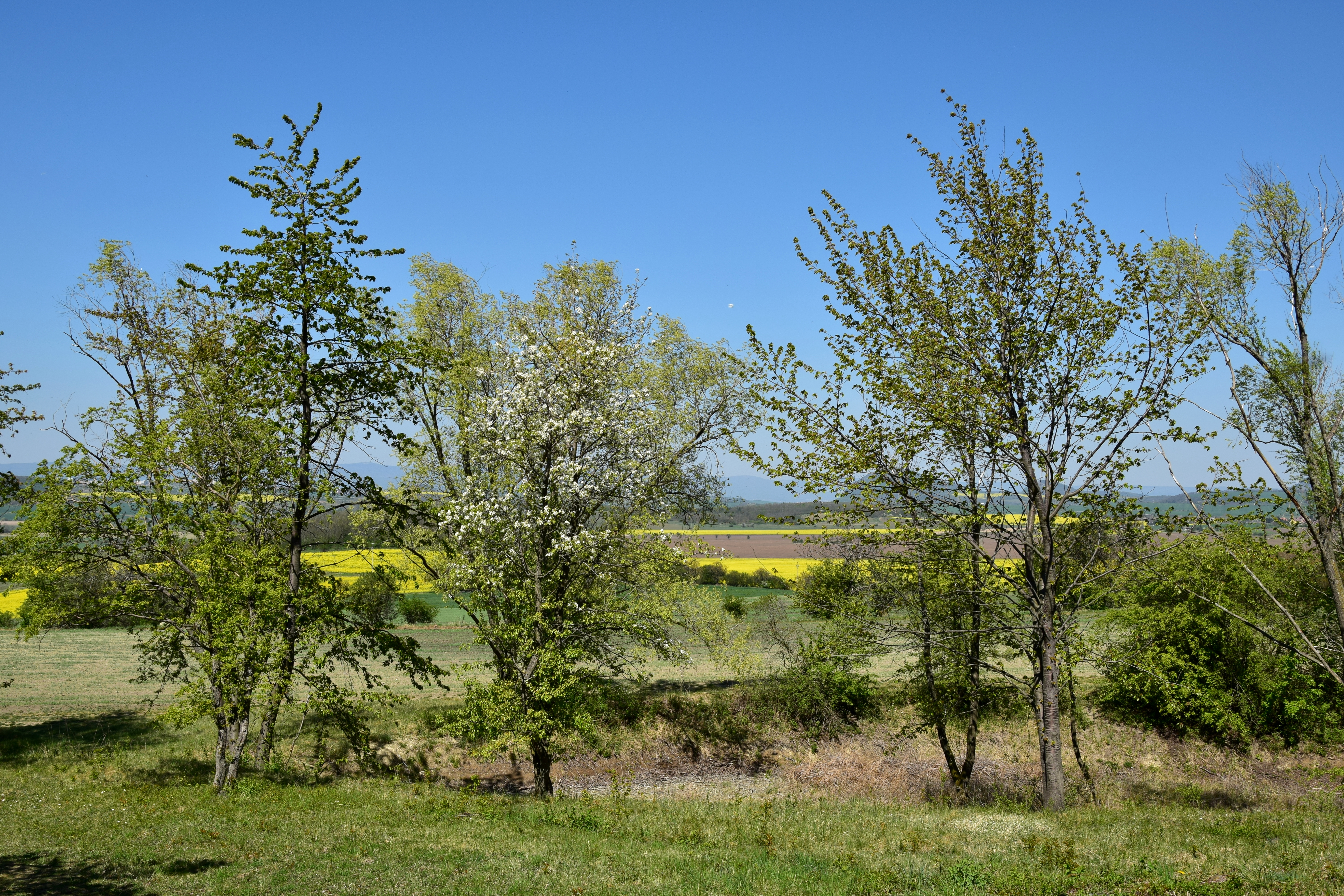 Přírodní památka Velká Volavka – vyschlá dolní vodní nádrž